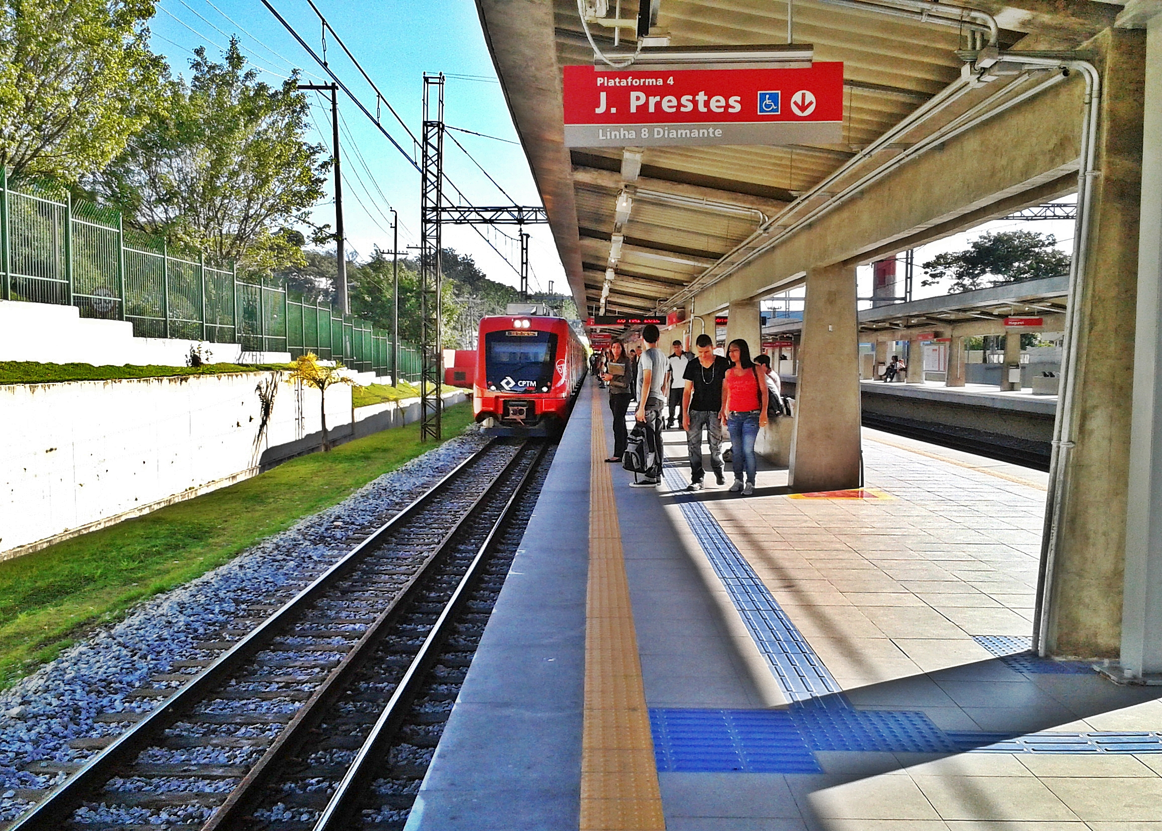 Estação Barueri da CPTM